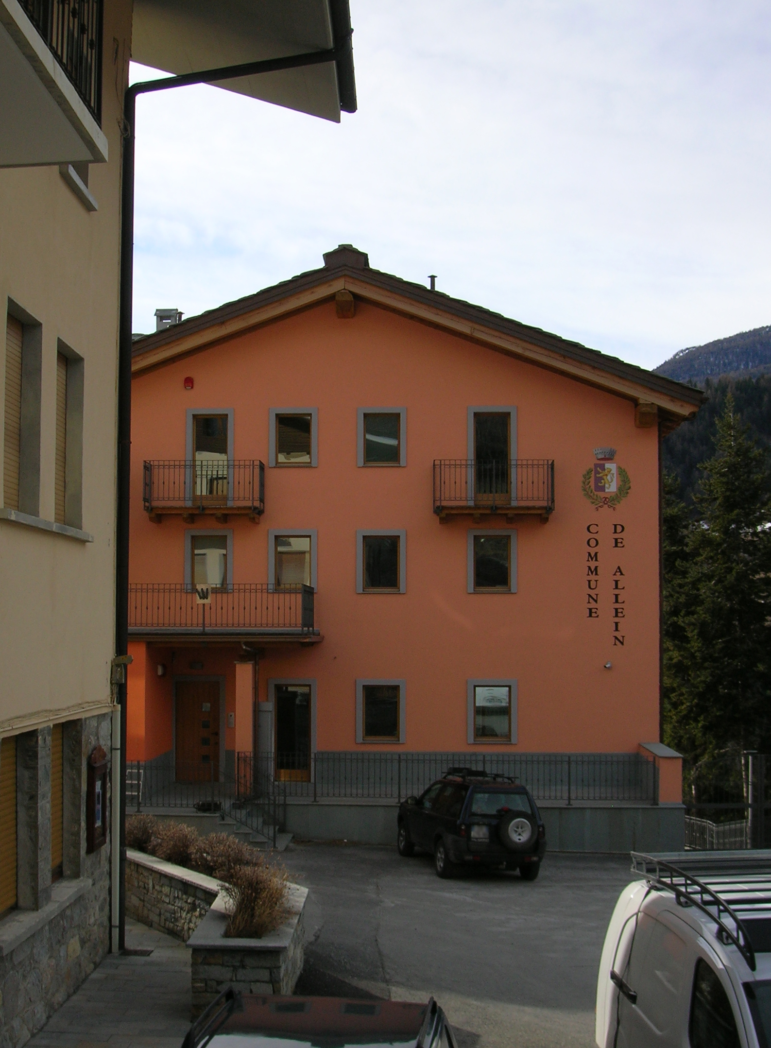 Municipio di Allein, Valle d'Aosta, Italia.